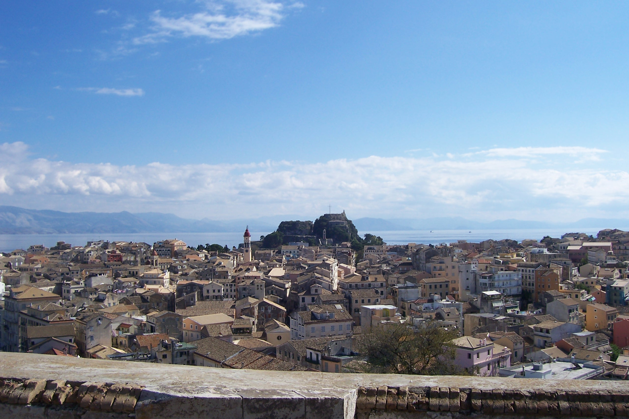 Παλιό Φρούριο και Παλιά Πόλη από το Νέο Φρούριο Κέρκυρας.